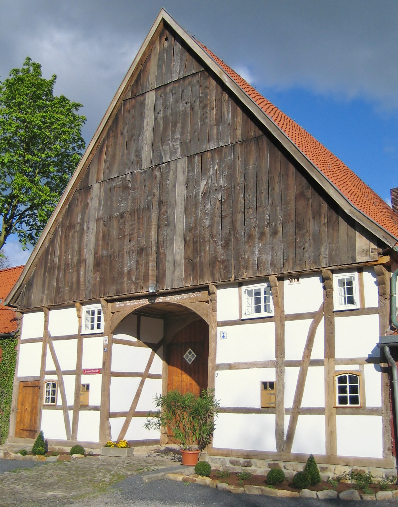 Grevinghof, Haupthaus von 1742, Vierständerbau mit Vorschauer. Denkmalschutzliste Bönen Nr. 7